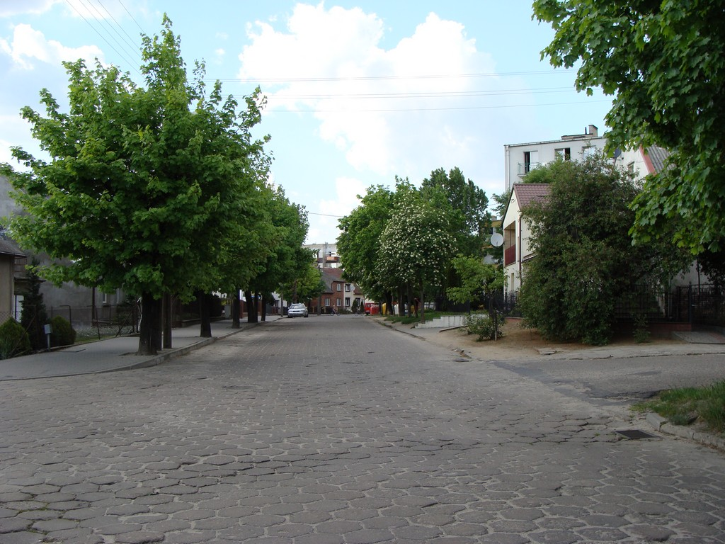 Śrem, Złodziejewo, ul. Przemysłowa.